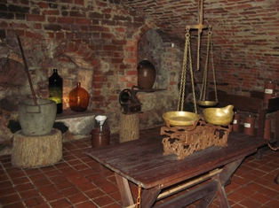 Lietuvos medicinos ir farmacijos muziejaus rūsys, Kaunas.